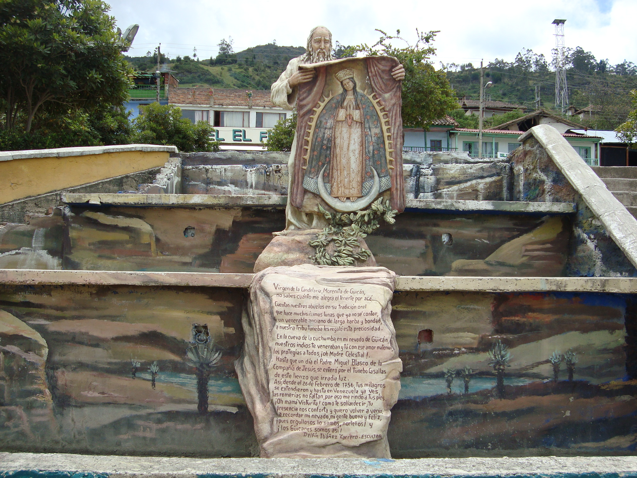 PARQUE DE GUICAN